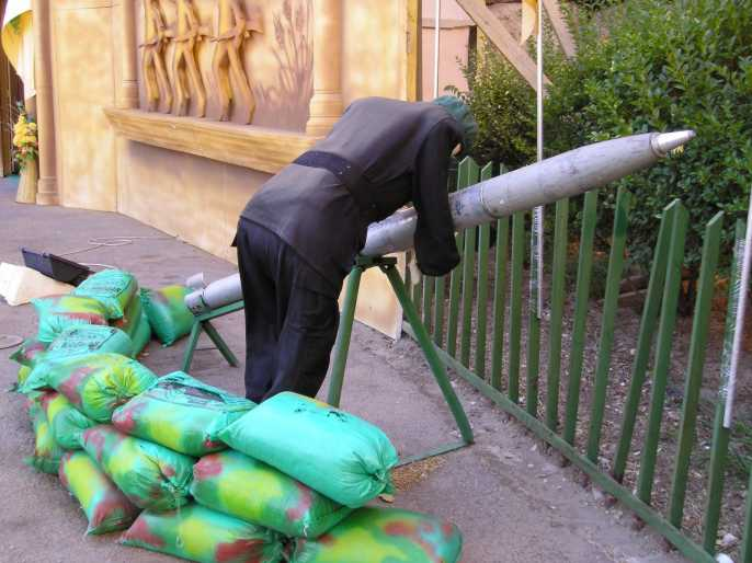 Makieta rakiety wystrzeliwanej przez Hezbollah na Izrael ("Wystawa libańskiego oporu", Baalbek, Liban, 2005 r.). Autor: Aotearoa